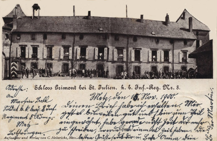 Schlokaserne Grimont bei Metz